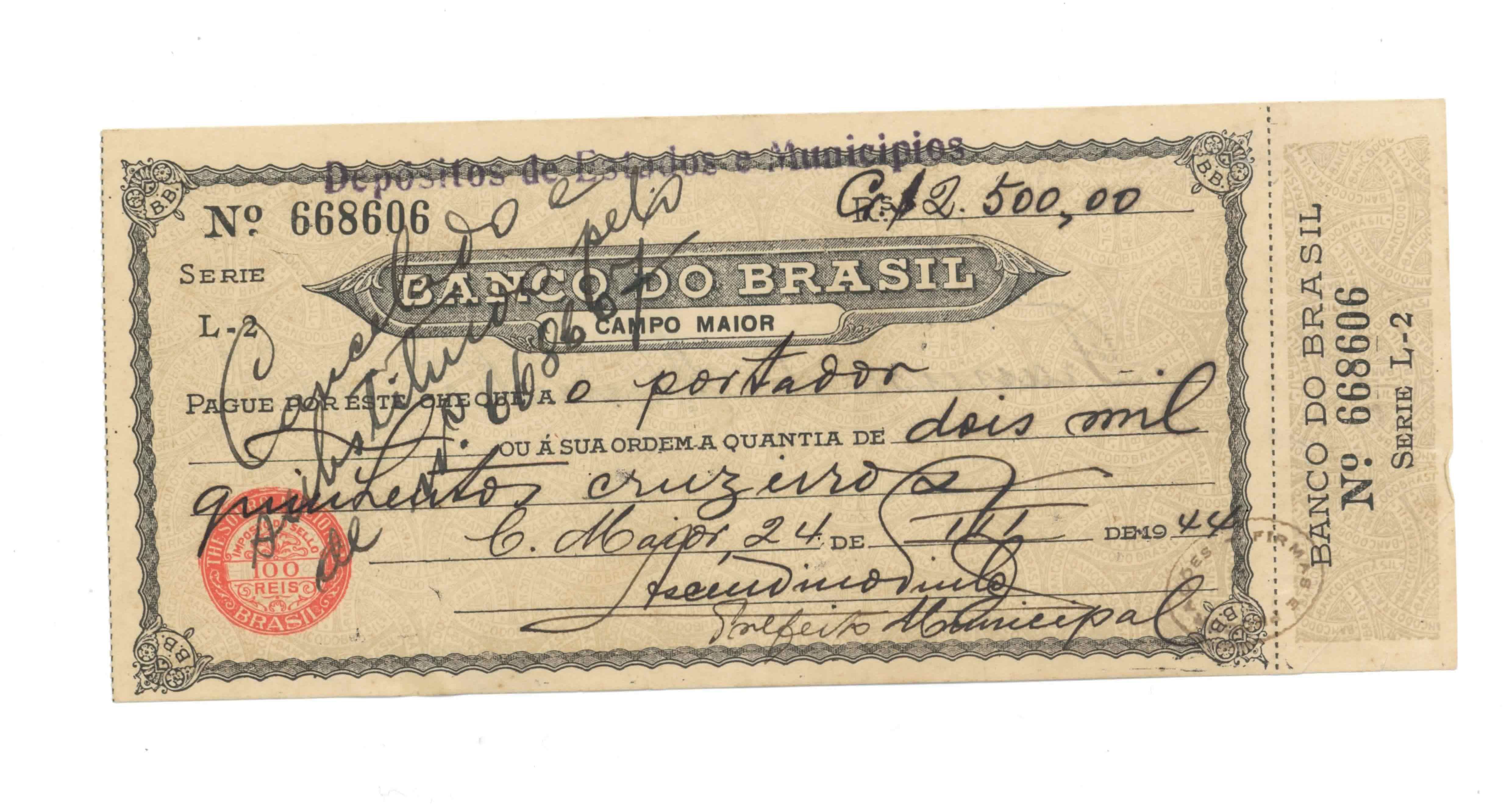 Cheque do banco do Brasil de 1944 assinado pelo prefeito municipal de Campo Maior (Piauí) Ascendino Pinto de Aragão.